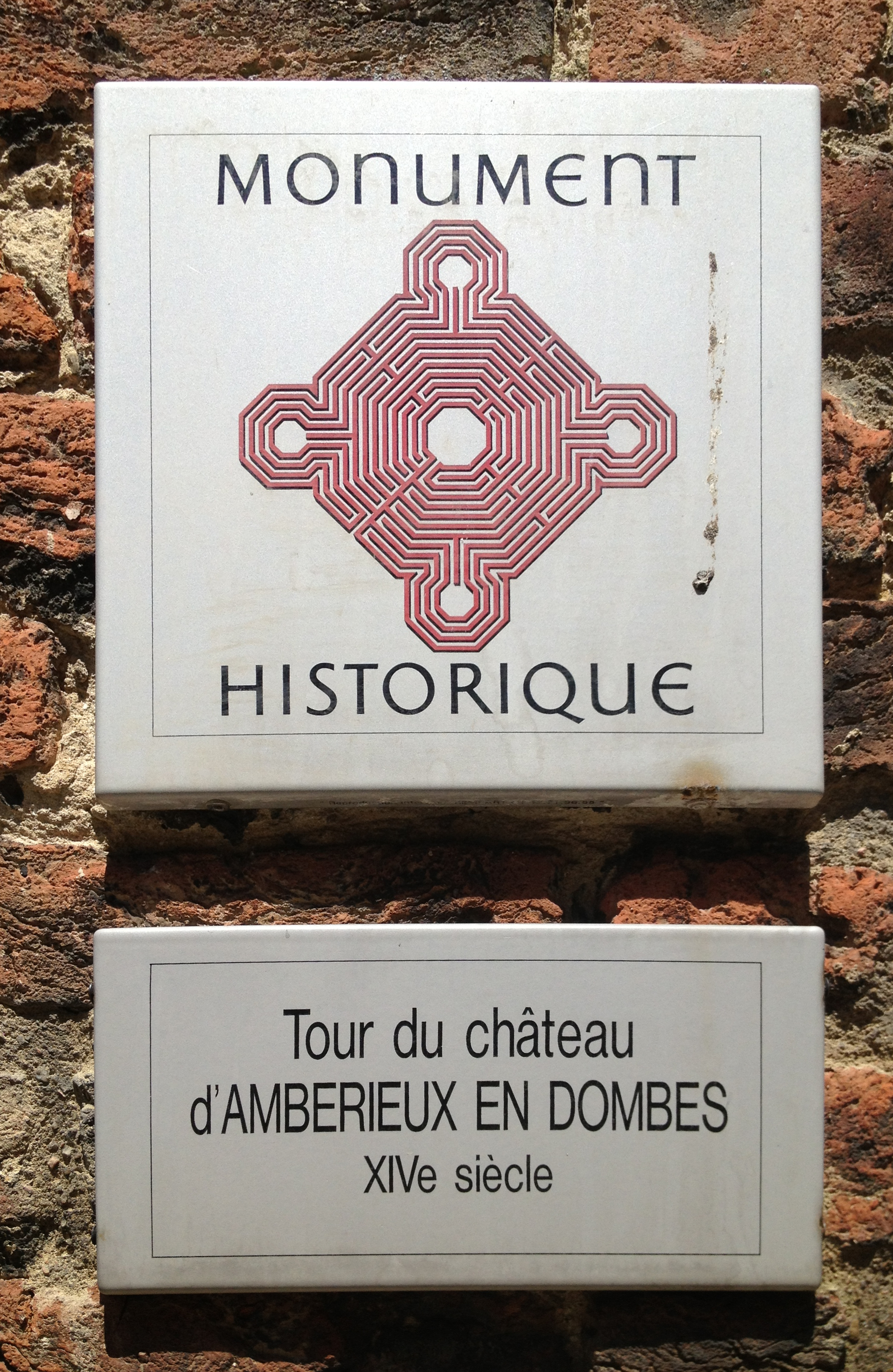 Plaque MH apposée sur une tour du château d'Ambérieux-en-Dombes.